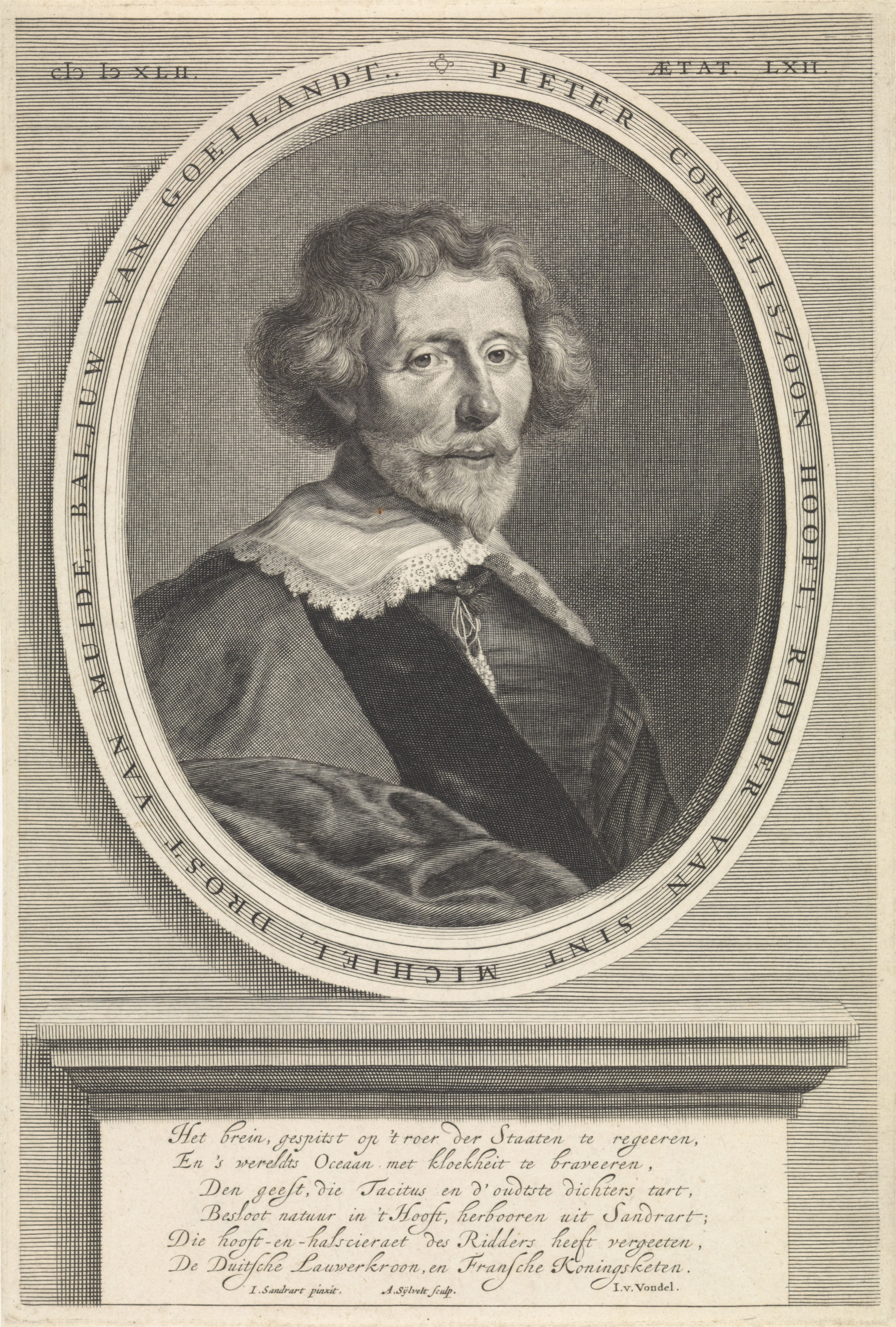 IdentificatieTitel(s): Portret van Pieter Cornelisz. HooftObjecttype: prent boekillustratie Objectnummer: RP-P-OB-24.774Catalogusreferentie: Hollstein Dutch 40-1(4)Opschriften / Merken: verzamelaarsmerk, verso, gestempeld: Lugt 2228opschrift, verso, handgeschreven: ‘Coll = Franken’gedicht, midden onder, gegraveerd: ‘Het brein, gespitst op 't roer der Staaten te regeeren / En'wereldts Oceaan, met kloekheit te braveeren....Die hooft- en halssieraet des Ridders heeft vergeeten / De Duitsche Lauwerkroon, en Fransche Koningsketen.’, gedicht VondelOmschrijving: Portret van Pieter Cornelisz. Hooft, dichter, dramaschrijver en historicus op 62-jarige leeftijd. Op de sokkel een zesregelig gedicht van Vondel.VervaardigingVervaardiger: prentmaker: Anthony van Zijlvelt (vermeld op object)naar schilderij van: Joachim von Sandrart (vermeld op object)schrijver: Joost van den Vondel (vermeld op object)Plaats vervaardiging: AmsterdamDatering: 1677Fysieke kenmerken: gravureMateriaal: papier Techniek: graveren (drukprocedé)Afmetingen: plaatrand: h 271 mm × b 183 mmToelichtingPrent gebruikt in: Hooft, Pieter Corneliszoon. Nederlandsche historien. Amsterdam: Joannes van Someren, Abraham Wolfgang, Dirk Boom (I), Hendrick Boom en Jacob de Jonge, 1677.OnderwerpWie: Pieter Corneliszoon HooftVerwerving en rechtenCredit line: Schenking van de heer D. Franken, Le VésinetVerwerving: schenking 1871Copyright: Publiek domein